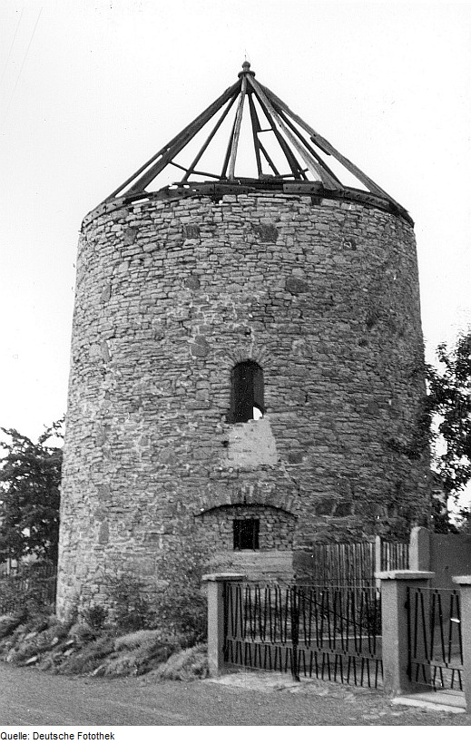 Original image description from the Deutsche Fotothek Gernrode. Turmholländer